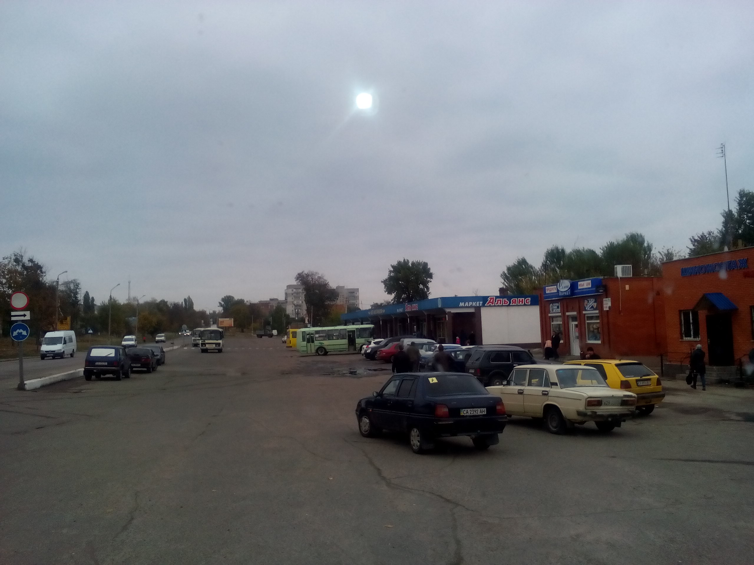 Автостанція у місті Сміла